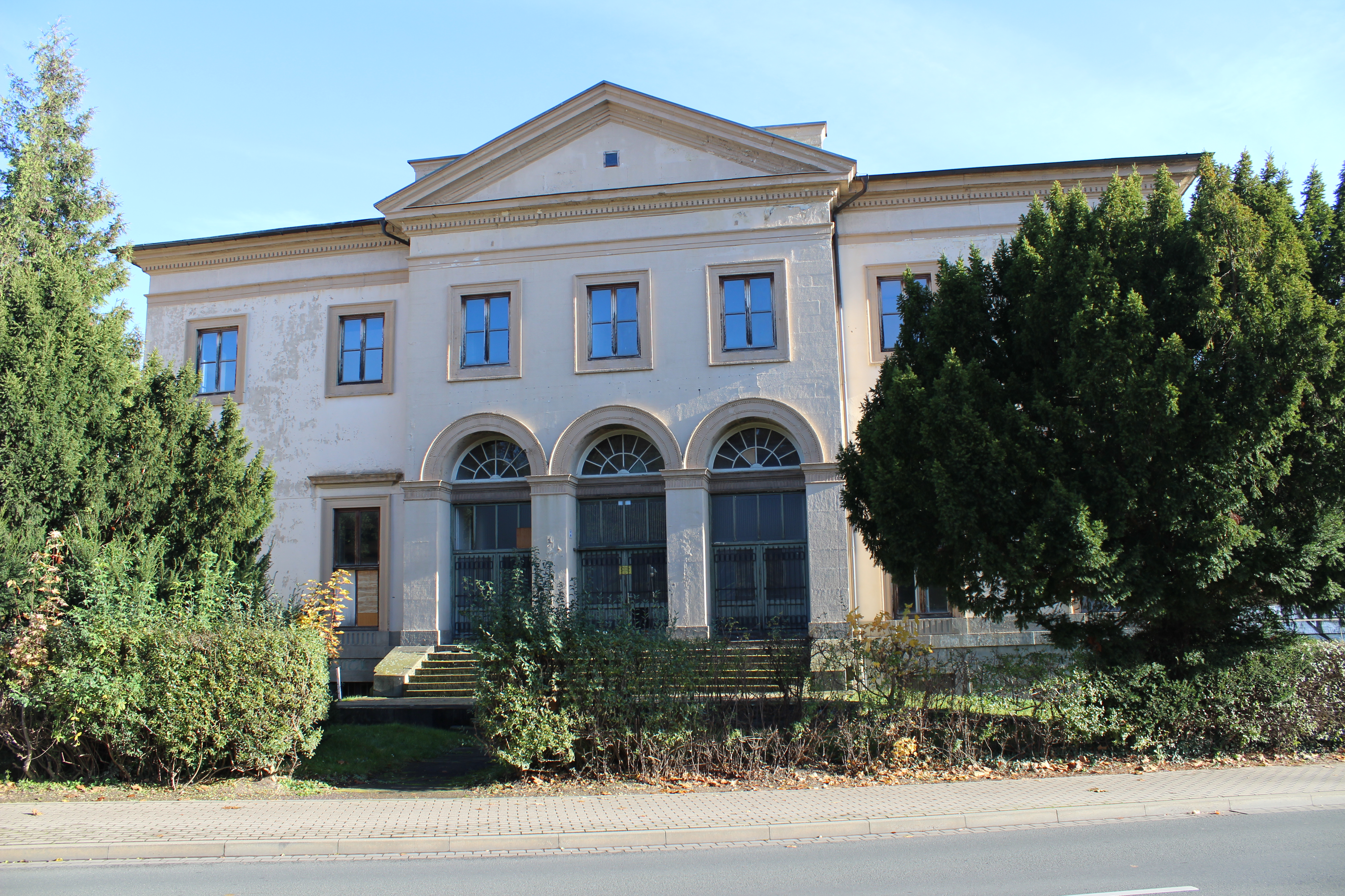 Prinzenpalais Ansicht Mozartstrasse 2